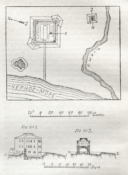 Это изо было использовано в статье «Головинский форт» опубликованной в восьмом томе «Военной энциклопедии», который был издан книгоиздательским товариществом И. Д. Сытина в 1912 году в столице Российской империи городе Санкт-Петербурге.